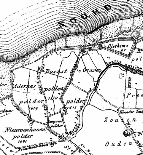 's-Gravenpolder (Groede)